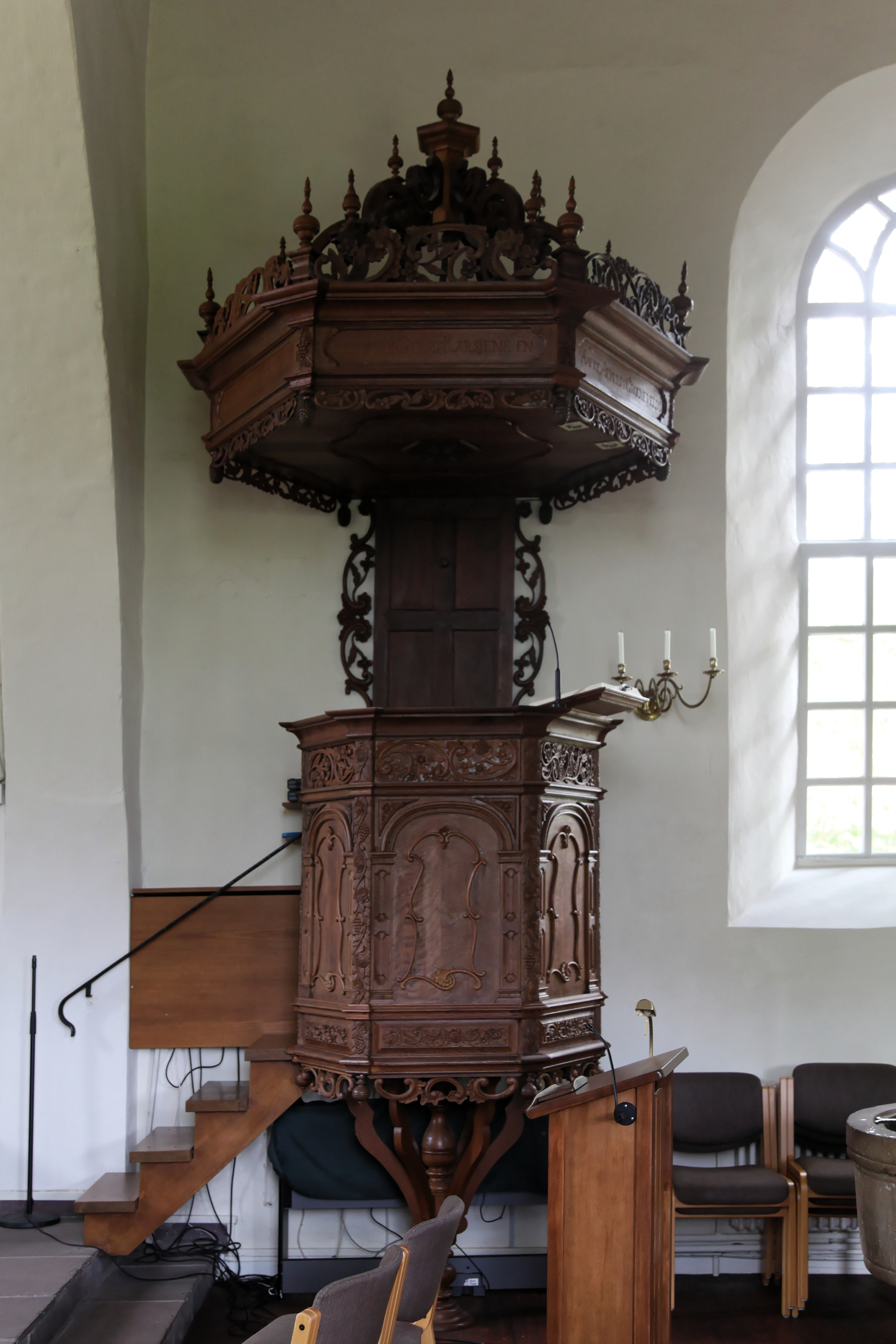 Reformierte Kirche (Loga), Am Schlosspark in Leer (Ostfriesland)